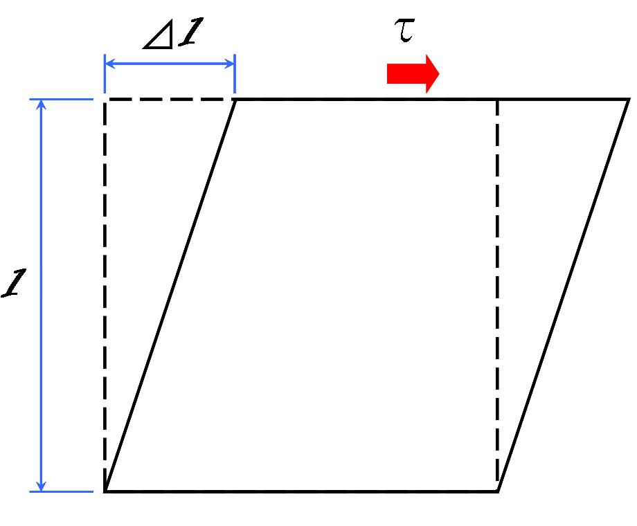 せん断変形イメージ